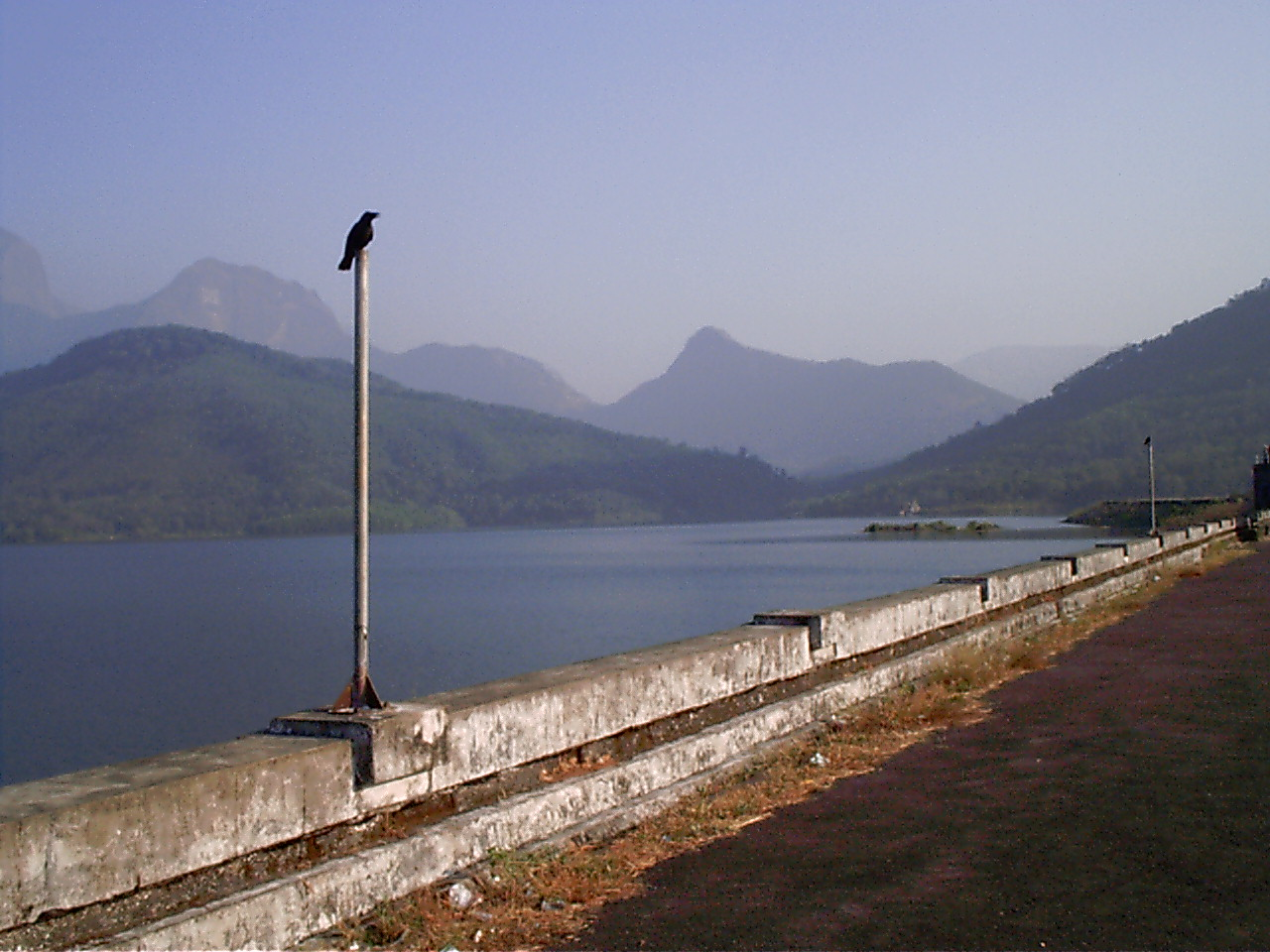 കാഞ്ഞിരപ്പുഴ ഡാമിന്റെ മുകളിൽ നിന്നുള്ള ഒരു ദൃശ്യം.